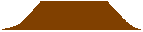 BMX-Dirtjumping: Table